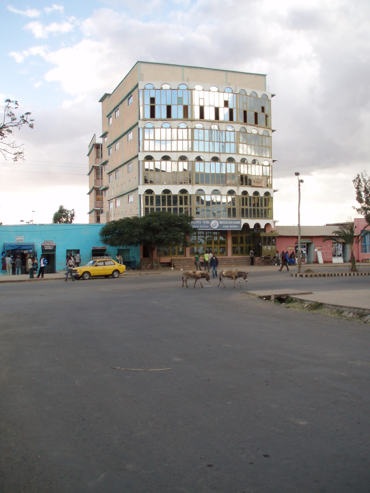 La partie moderne de la ville d'Axoum